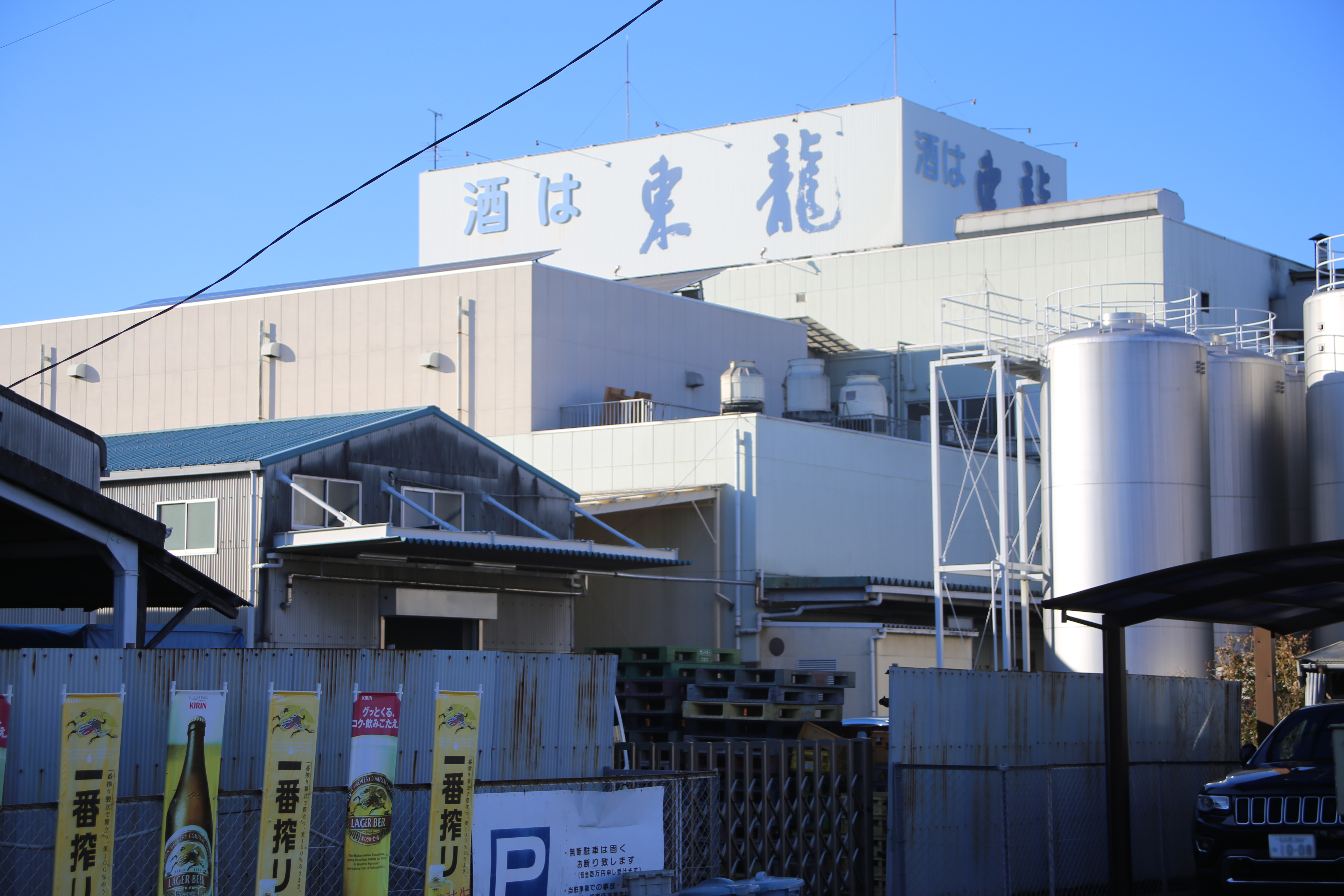 名古屋市守山区瀬古東の東春酒造本社